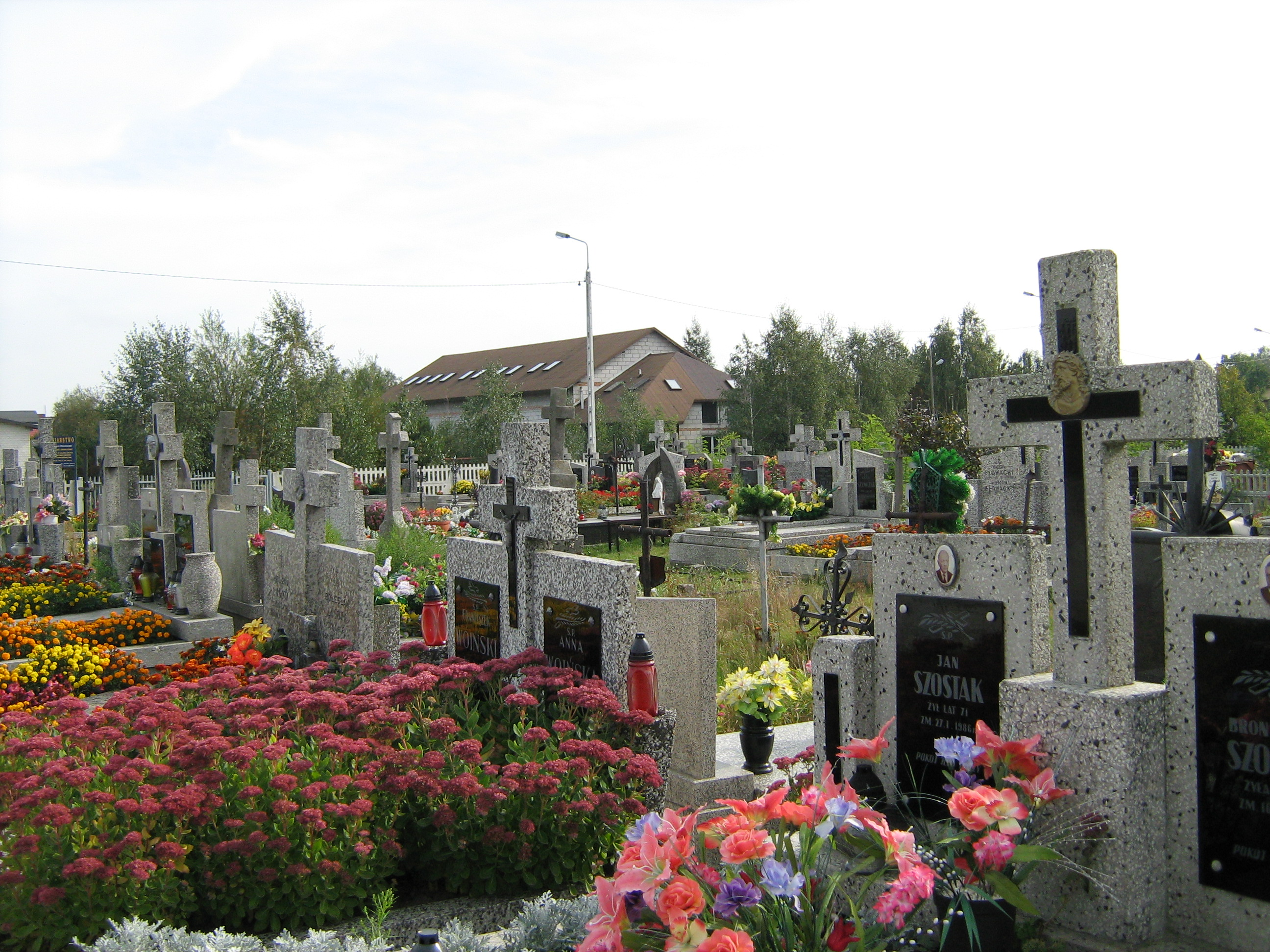 Catholic Mariavite Church Cementery in Dluga Koscielna (Poland) Cmentarz Kościoła Katolickiego Mariawitów w Długiej Kościelnej